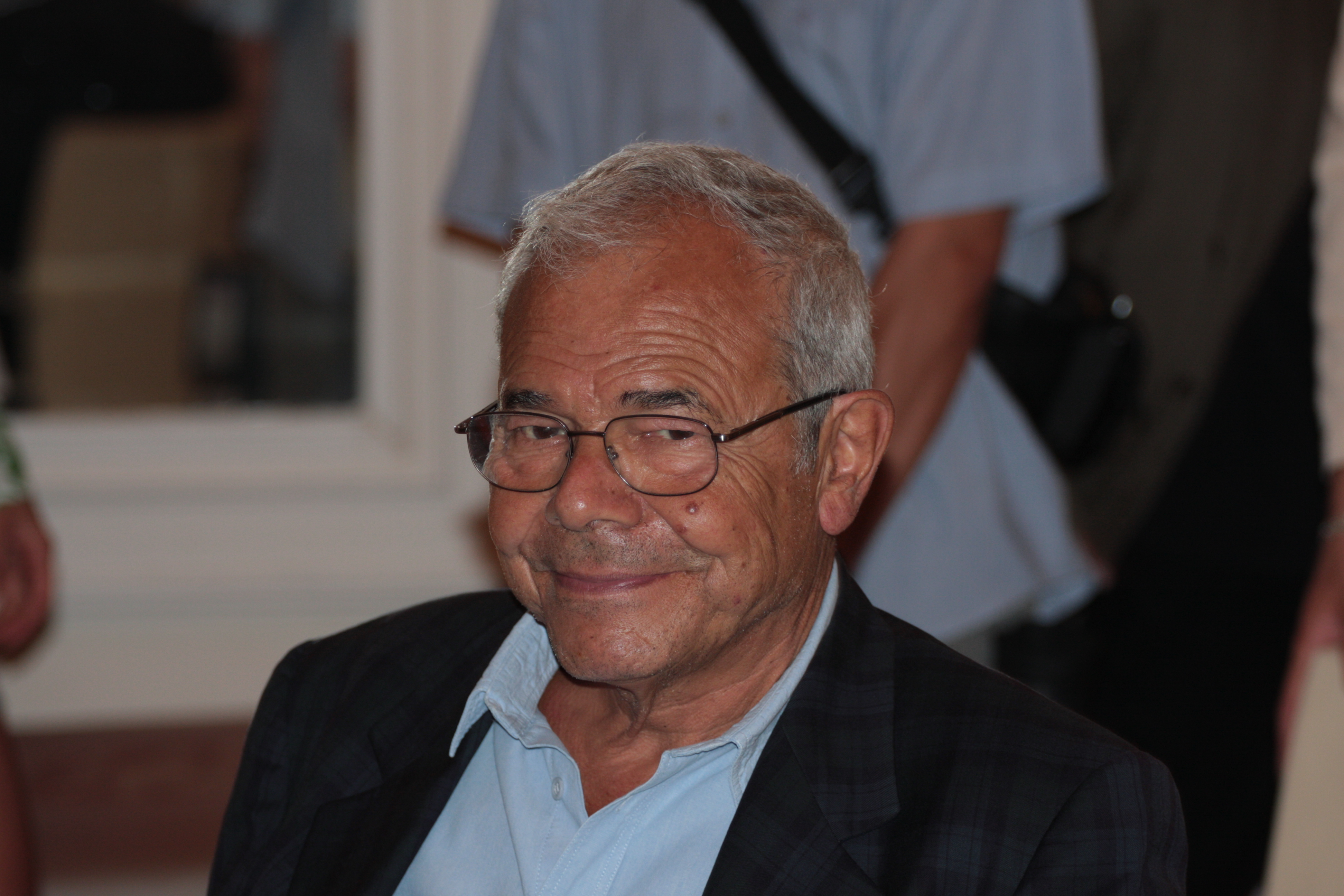 Il giornalista Mario Luzzato Fegiz